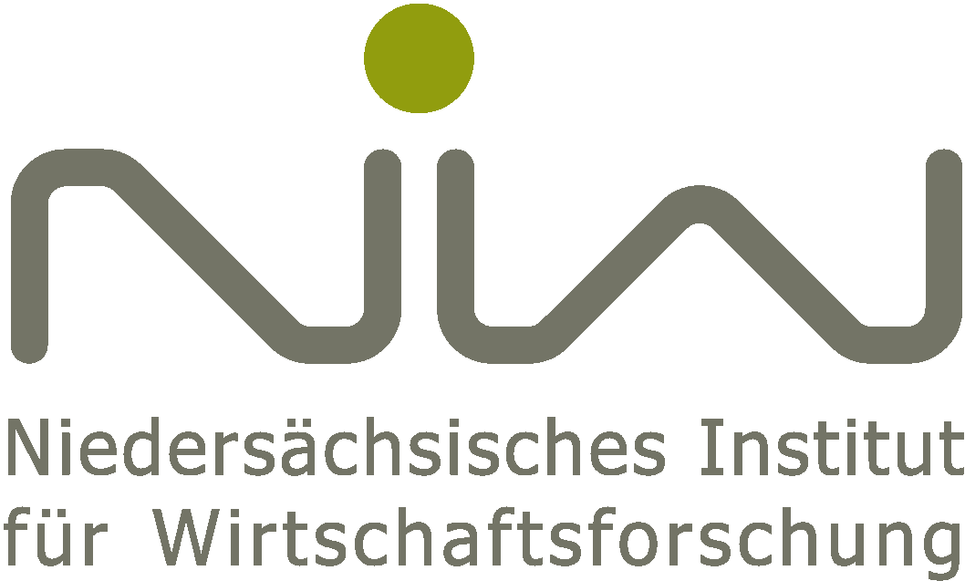 Logo NIW